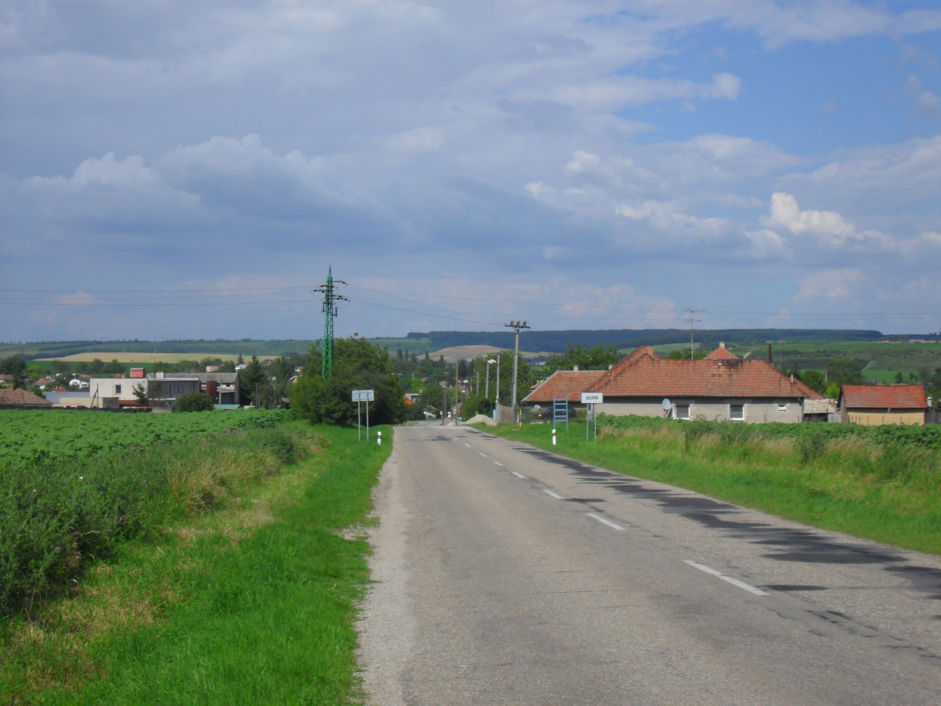 Jászfalu - a falu Perbete felé eső vége